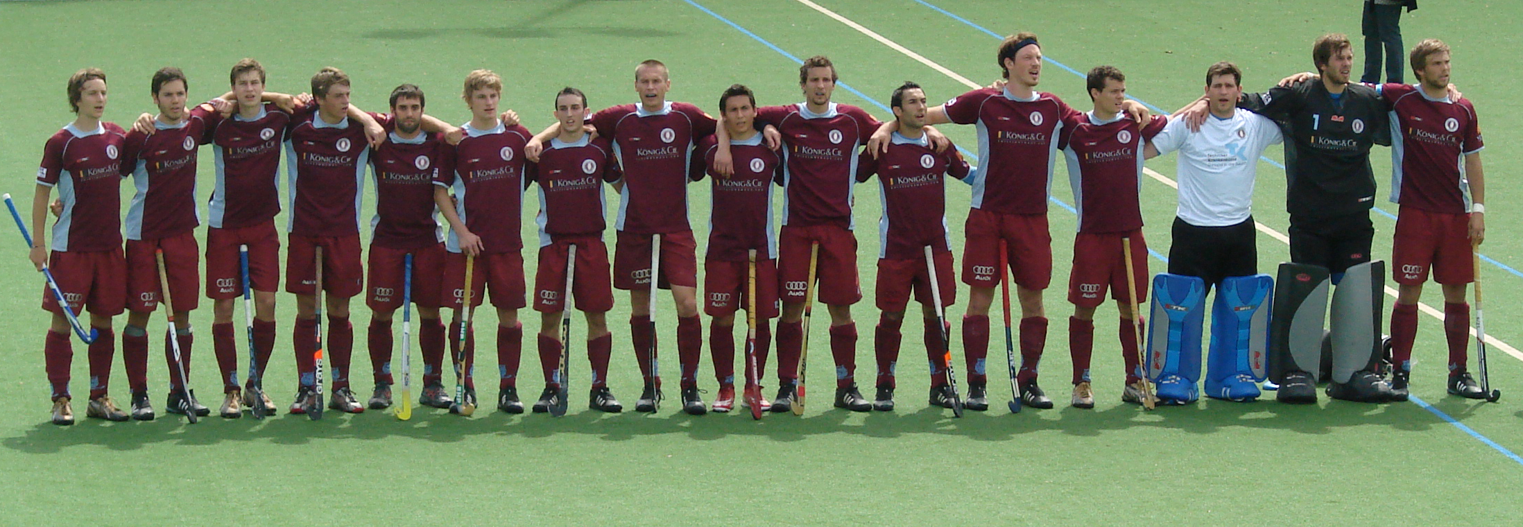 1.Herren des Uhlenhorster HC vor dem Endspiel um die Deutsche Meisterschaft 2009 gegen RW Köln